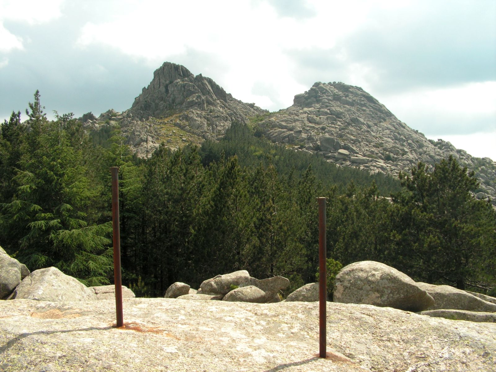 monte limbara Io sono l'autore dell'immagine.